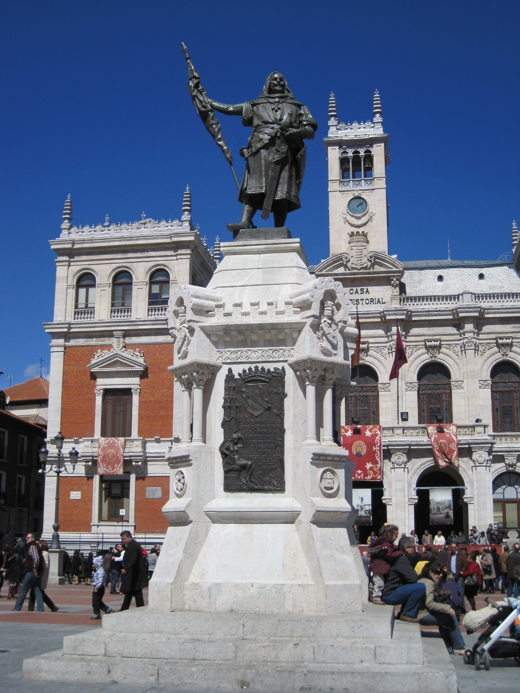 Estatua del Conde Ansúrez, en la plaza Mayor de Valladolid (España).